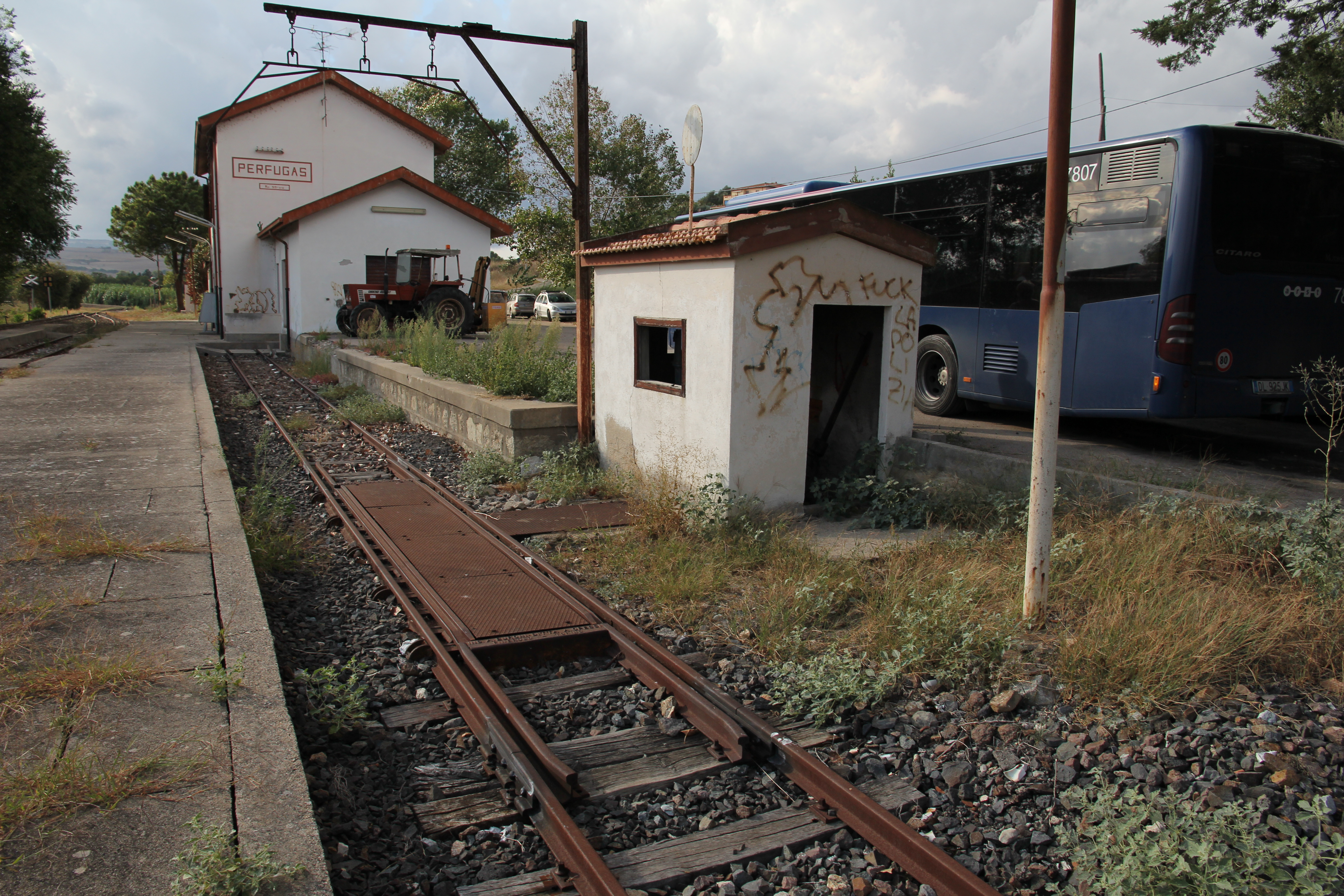 Perfugas - Stazione ferroviaria